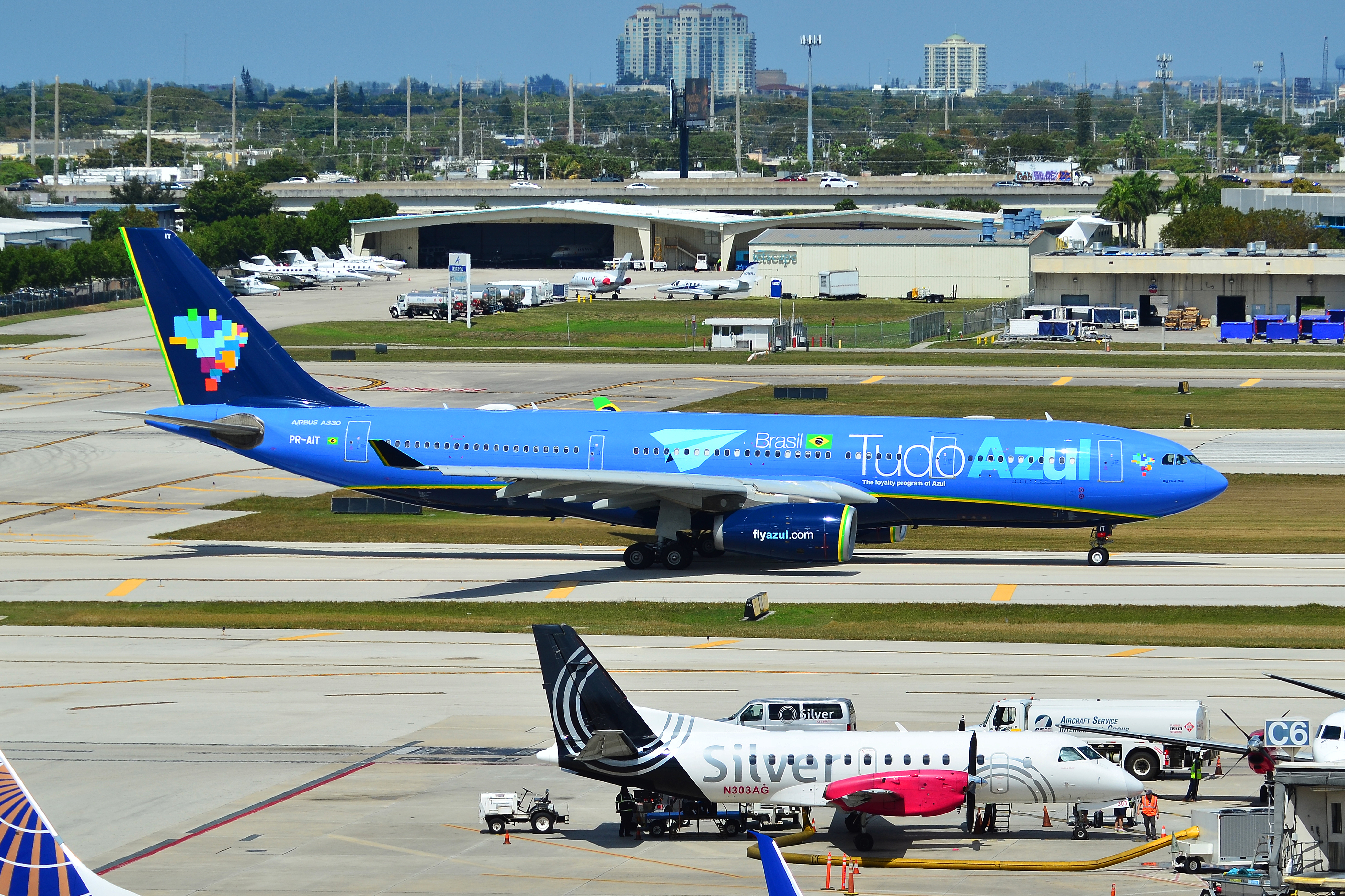 PR-AIT A330 Azul Tudo FLL Big Blue Bus JTPI 2066